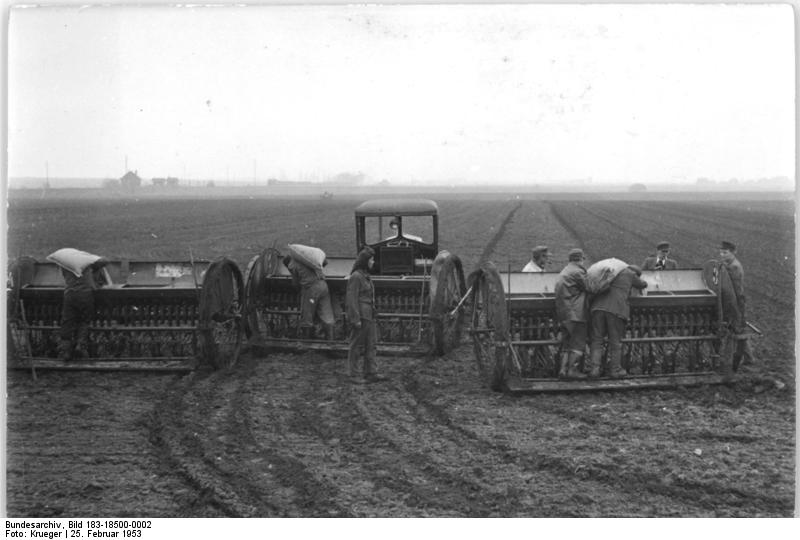 LPG Schwoitsch, Befüllen der Sämaschinen Zentralbild Krüger-25.2.1953 Frühjahrsbestellung hat begonnen. In der Produktonsgenossenschaft "8. Mai" in Schwoitsch, Saalkreis, wurde am 23. Februar 1953 bereits mit der Frühjahrsbestellung begonnen.